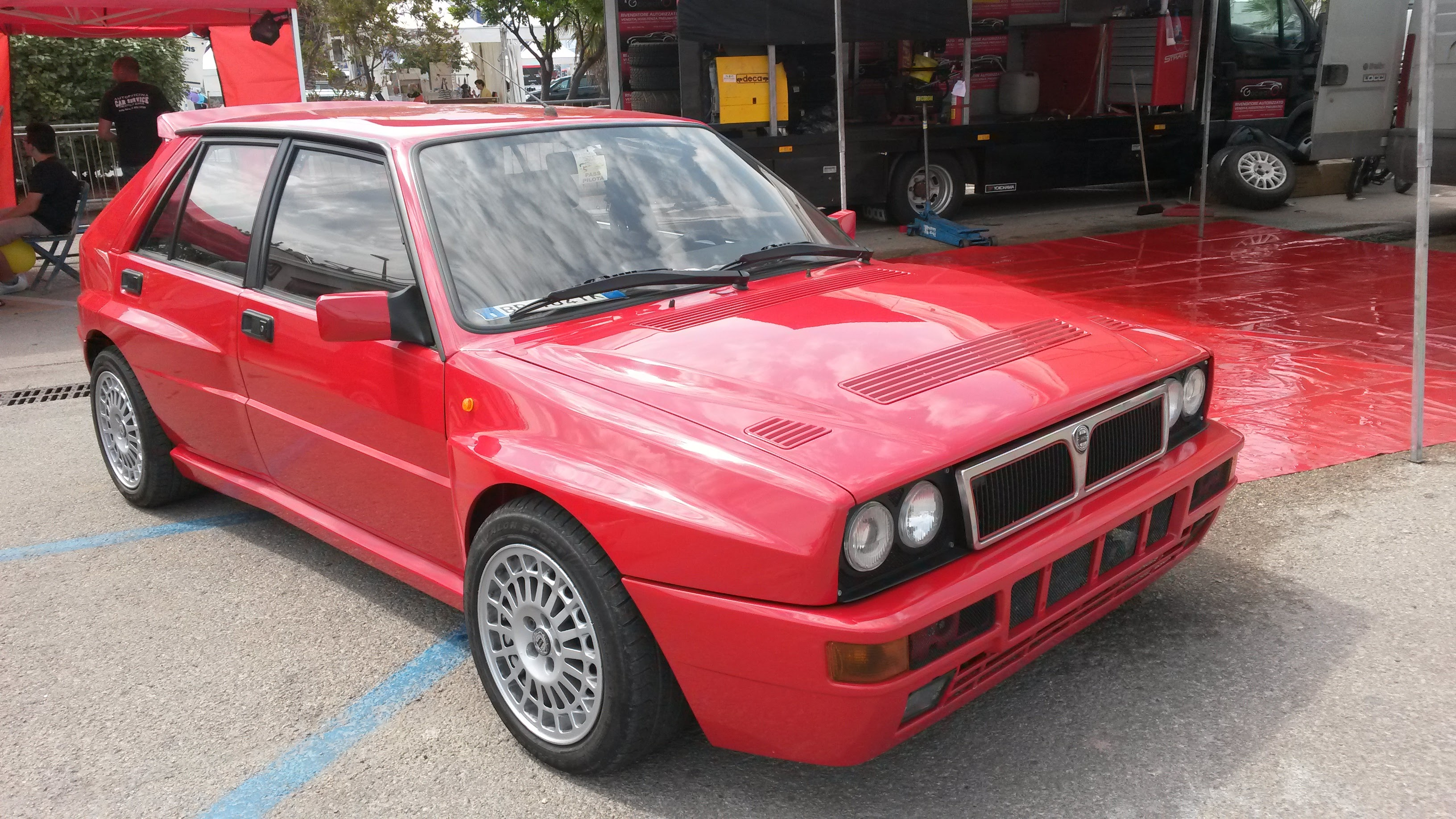 Un esemplare della Lancia Delta HF Integrale Evoluzione in colorazione Rosso Monza.